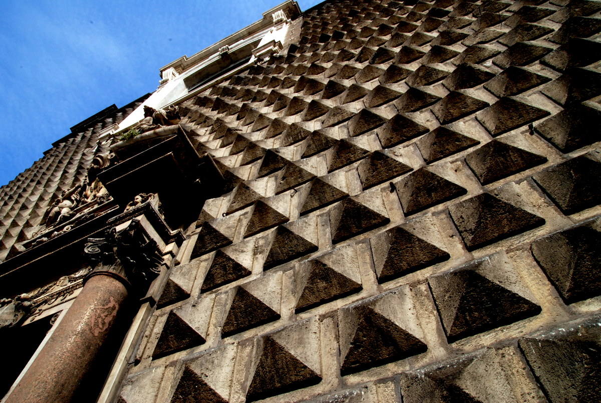 chiesa del cristo nuovo